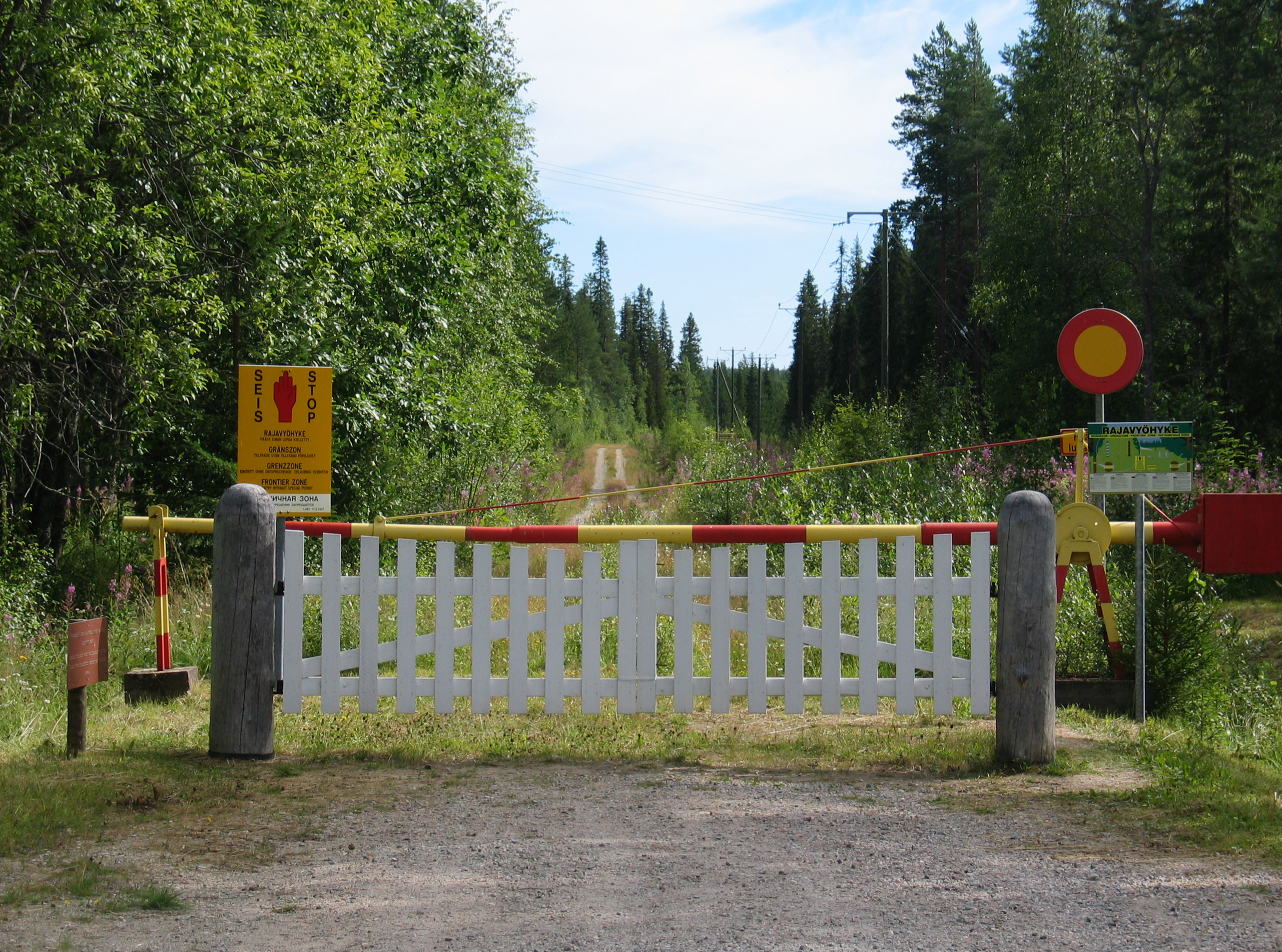 Finnish border in Raattentie